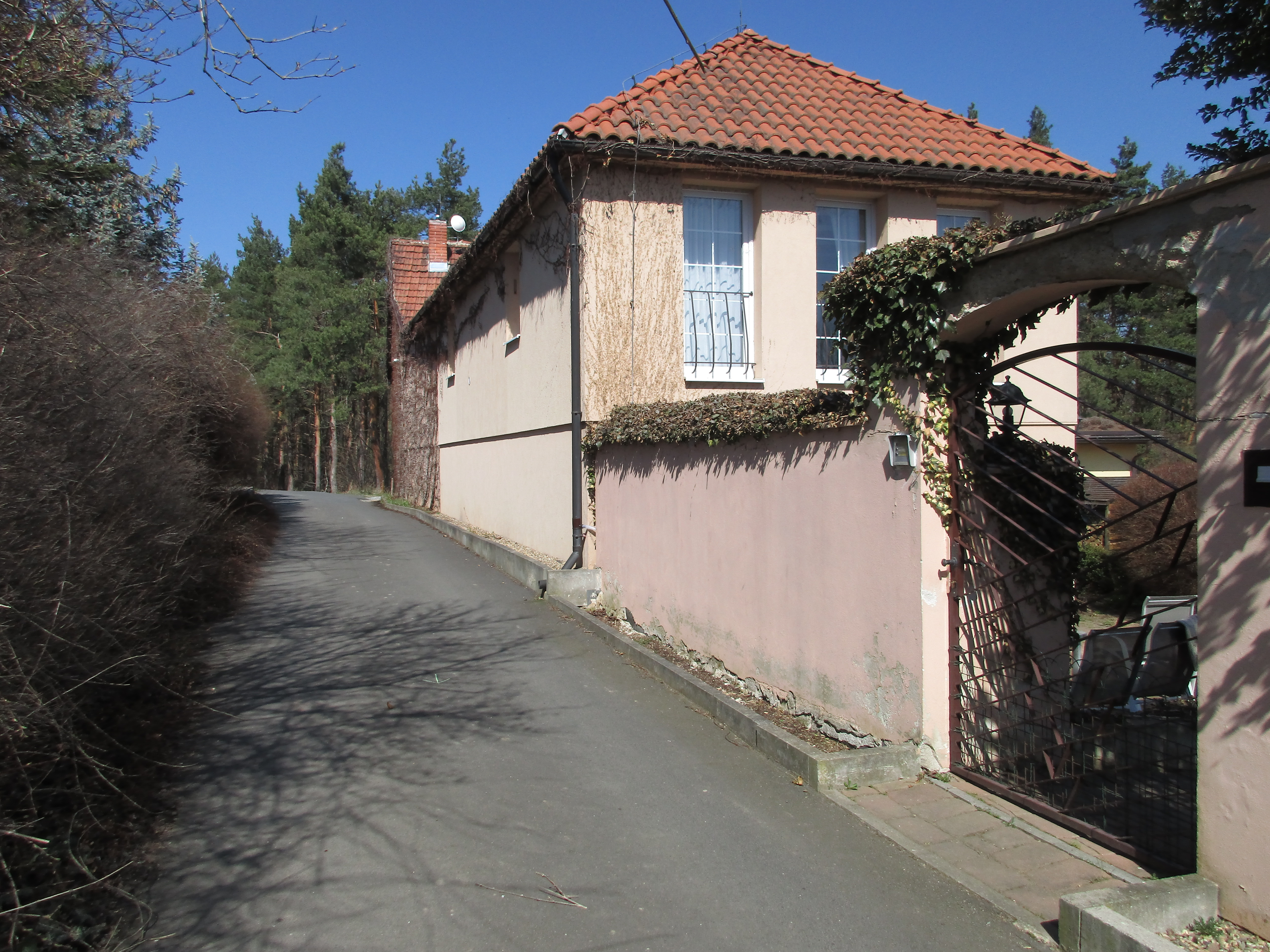 Markyta, Praha 6-Nebušice, čp. 106.